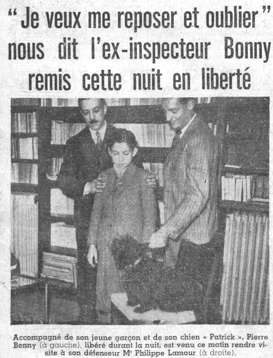 Pierre Bonny après sa condamnation et sa révocation de la Sûreté, son fils Jacques et son avocat Philippe Lamour, à la une du quotidien Paris-soir, dans un article titré "Je veux me repose et oublier" nous dit l'ex-inspecteur Bonny", le 31 octobre 1935.